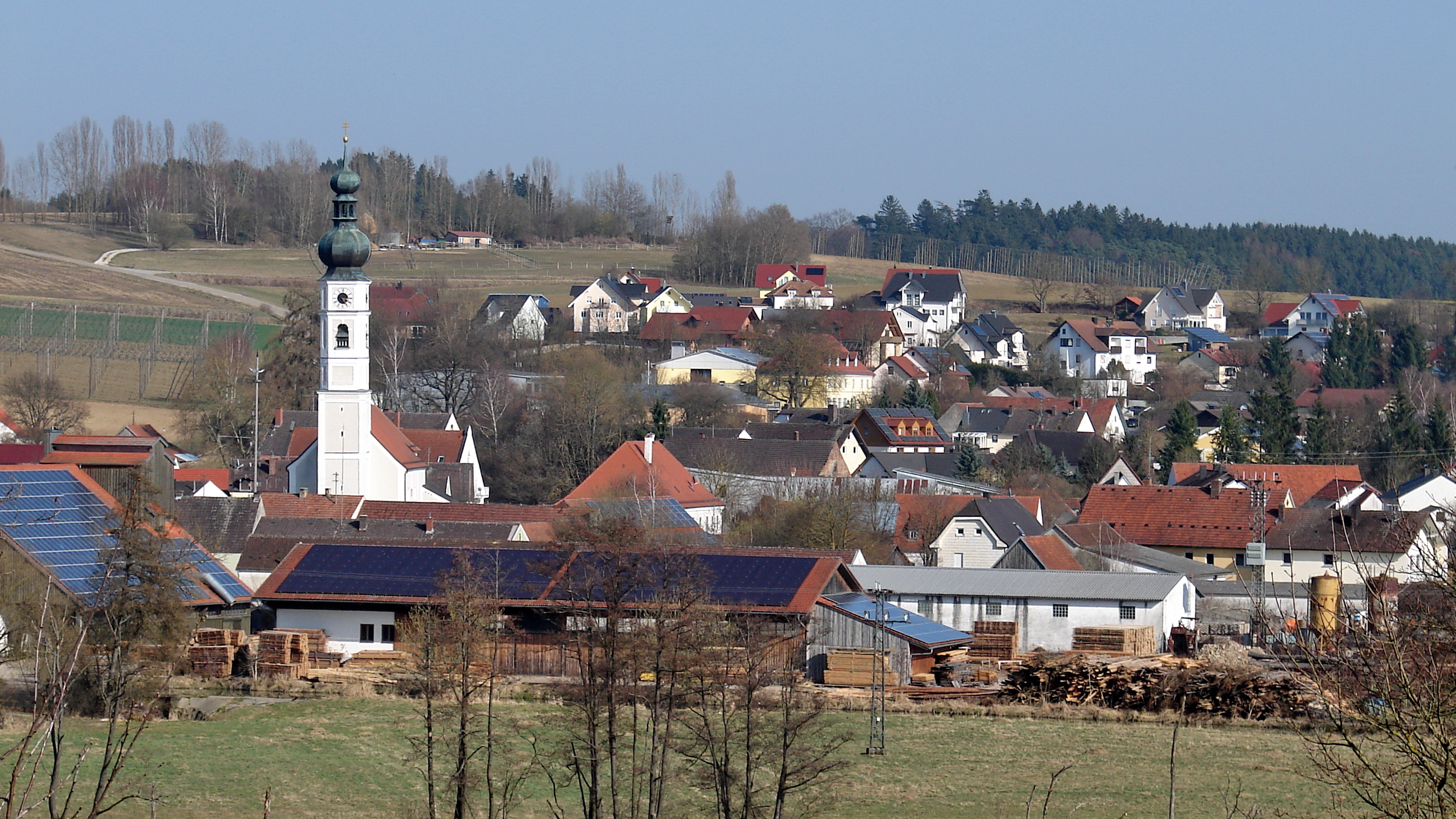 Elsendorf ist eine Gemeinde im niederbayerischen Landkreis Kelheim und ein Mitglied der Verwaltungsgemeinschaft Mainburg.